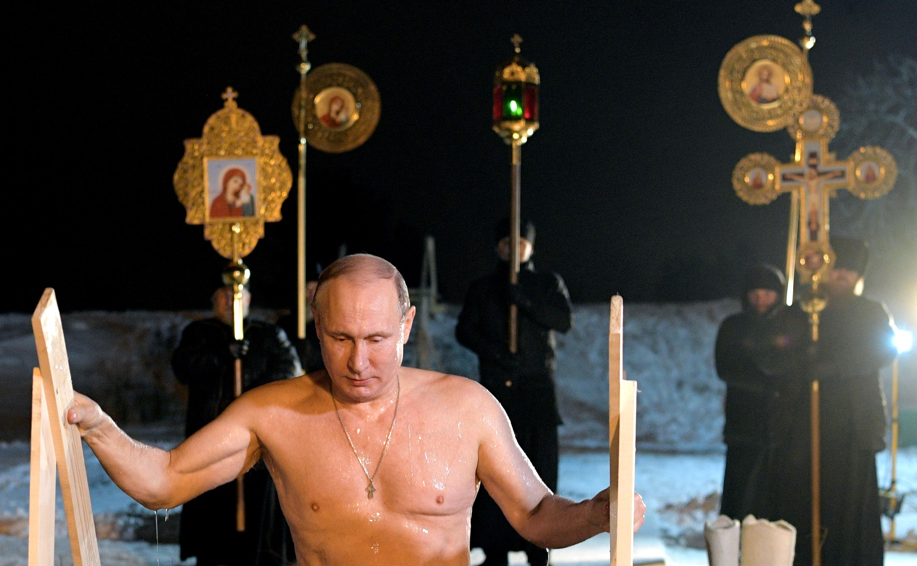 Владимир Путин поучаствовал в крещенских купаниях на озере Селигер.